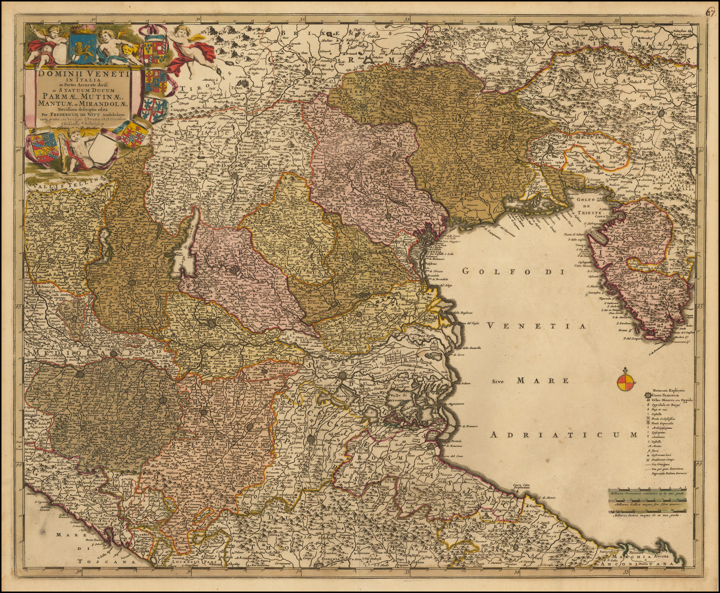 Dominii Veneti in Italia in Partes Accurate divisi ac Statuum Ducum Parmae, Mutinae, Mantuae et Mirandolae, Novissima descriptio edita